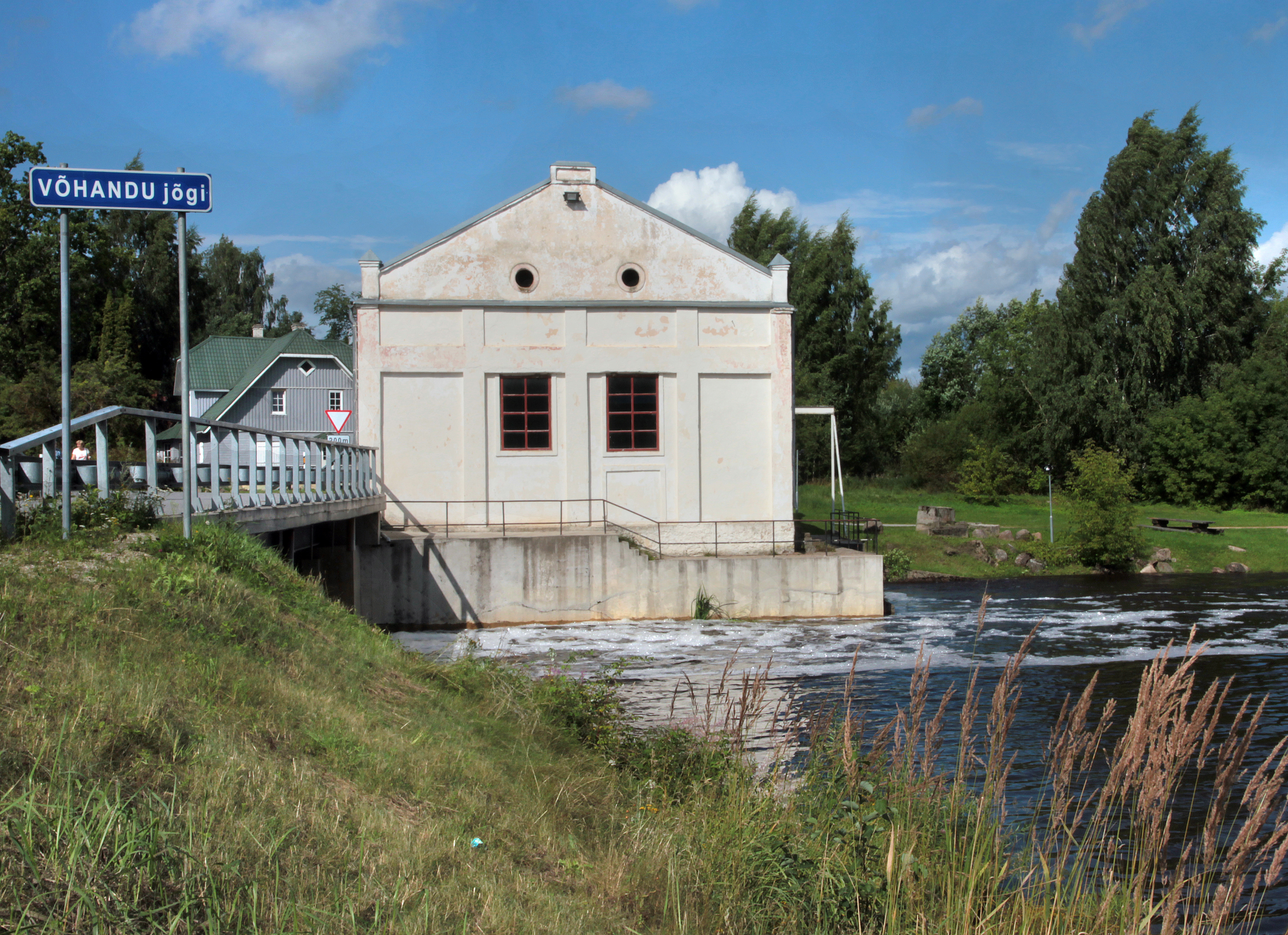 Leevaku hüdroelektrijaam Võhandu jõel